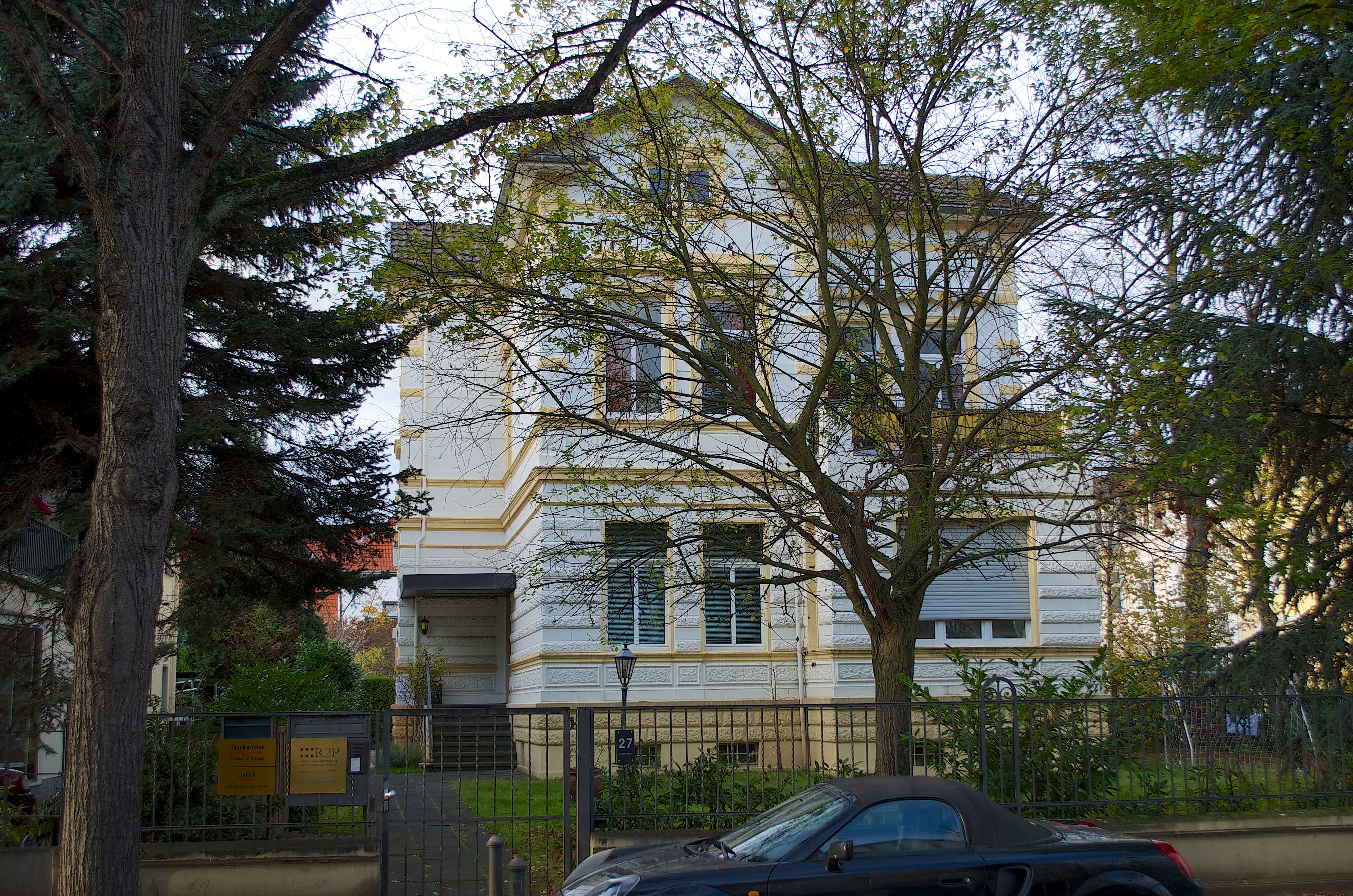 Denkmalgeschützte Villa Rheinallee 27 (ehem. Botschaft des Libanon) in Bad Godesberg , Ortsteil Godesberg-Villenviertel